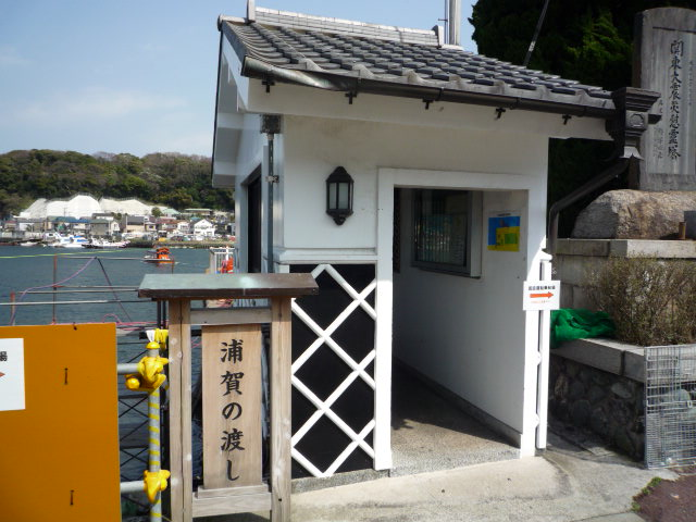 渡し船西浦賀乗船口を撮影。